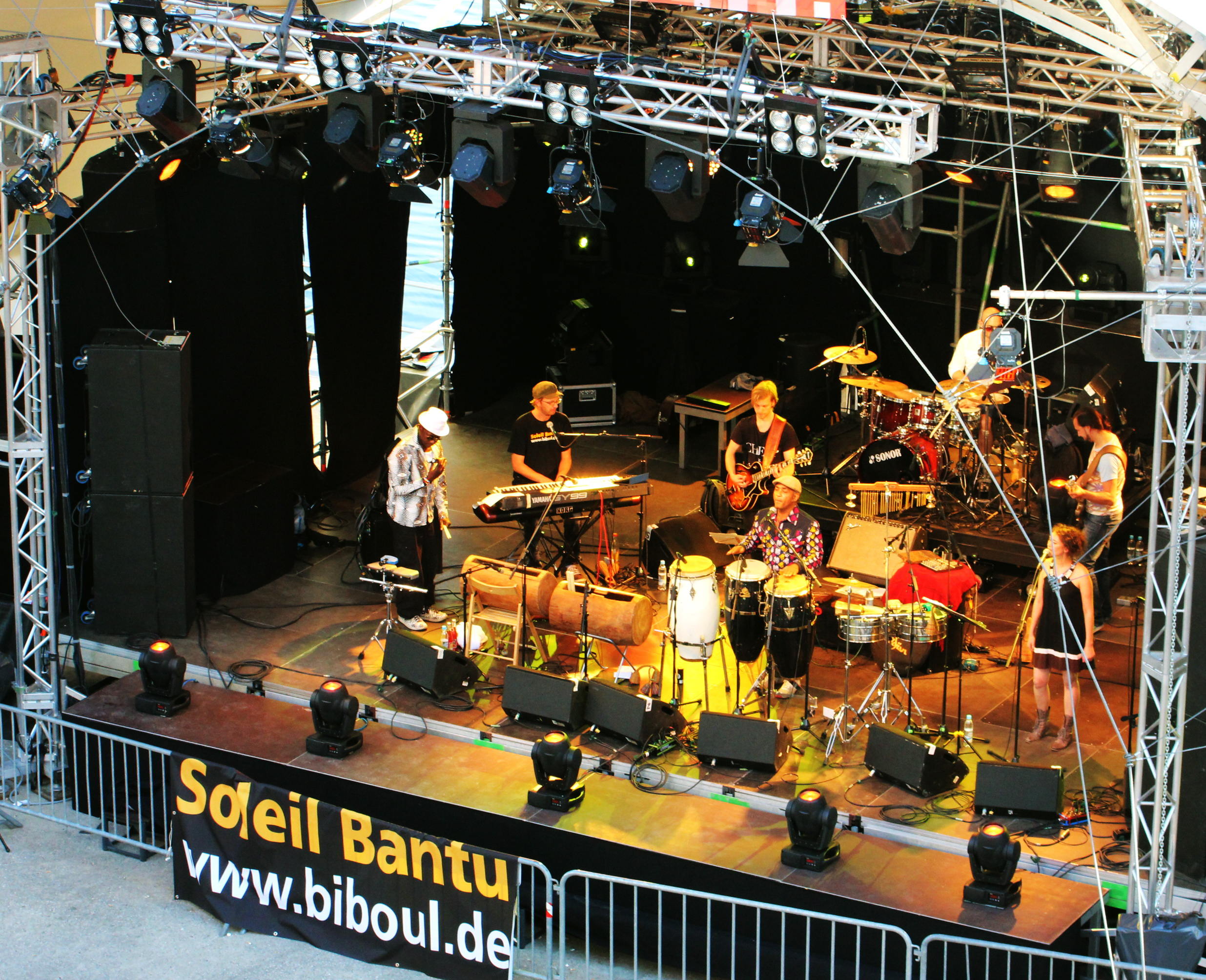 Band Soleil Bantu im Theatron Olympiapark München